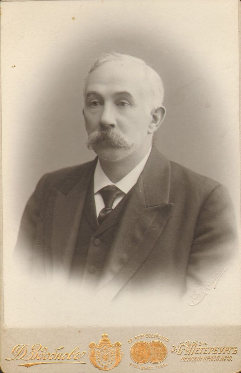 Eduardas Volteris in Saint Petersburg